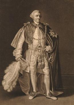 John Griffin, 4th Baron Howard de Walden